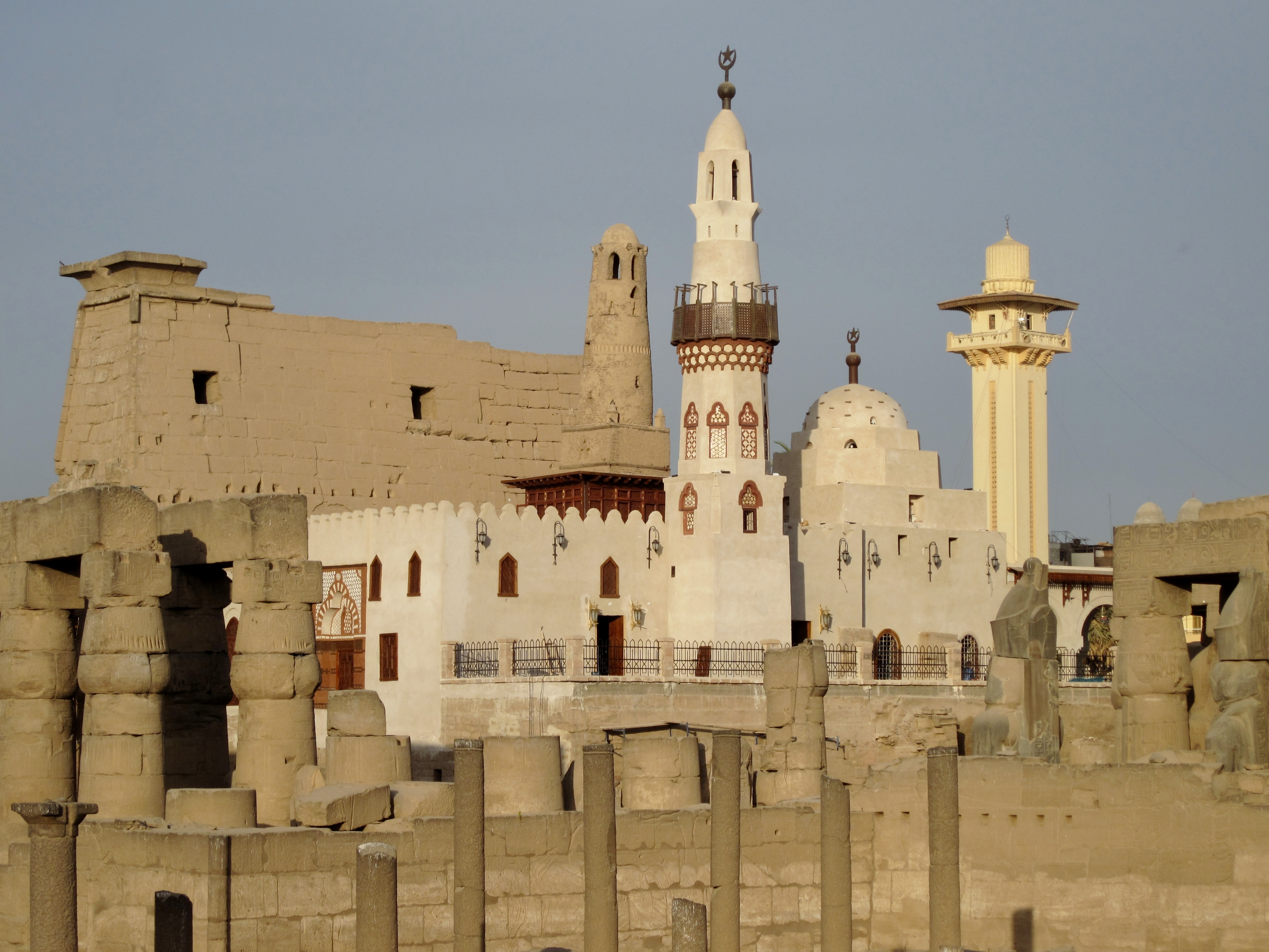 Moschee Abu el-Haggag innerhalb des Tempels von Luxor, Ägypten